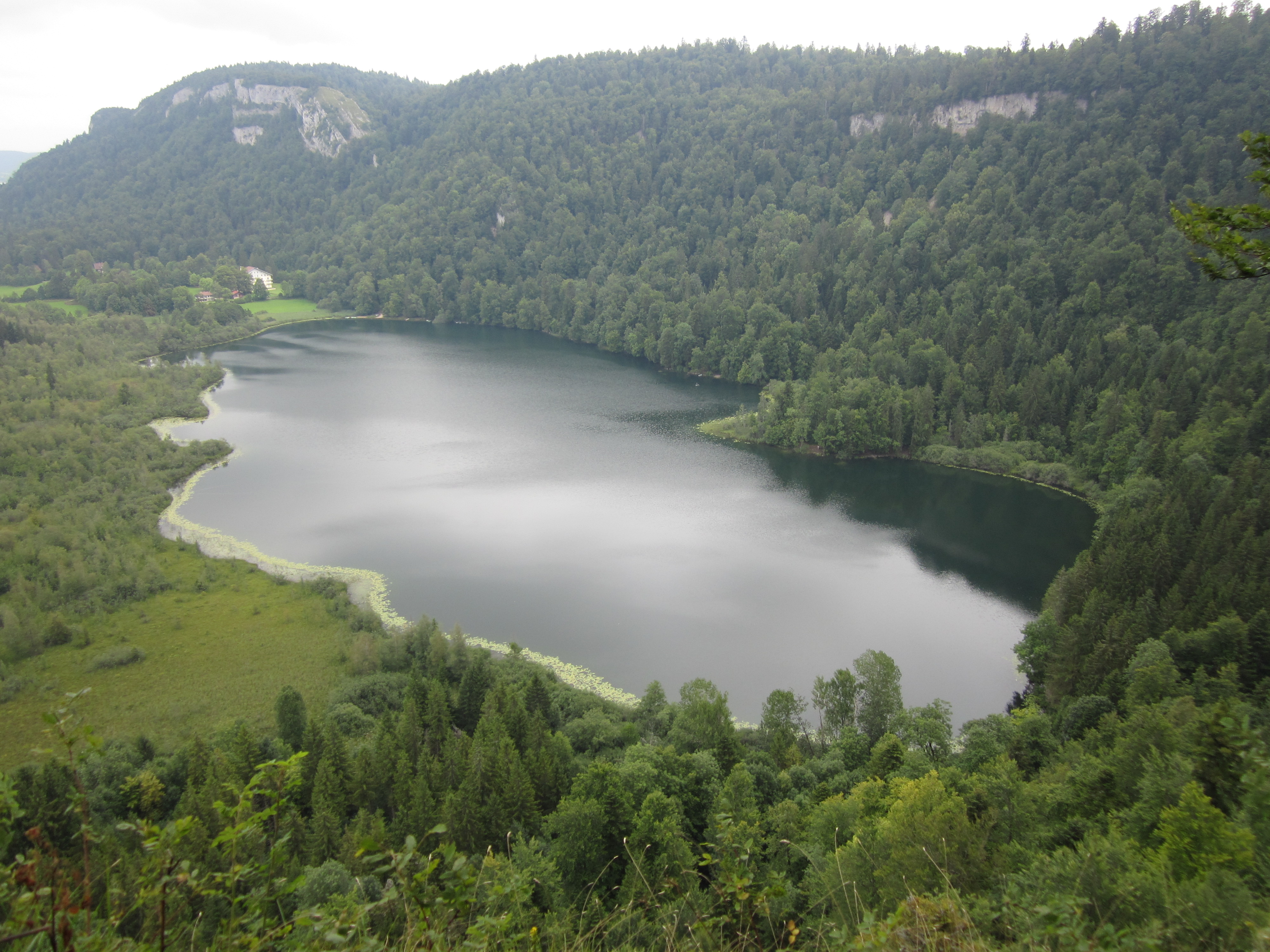 Lac de Bonlieu depuis un belvédère